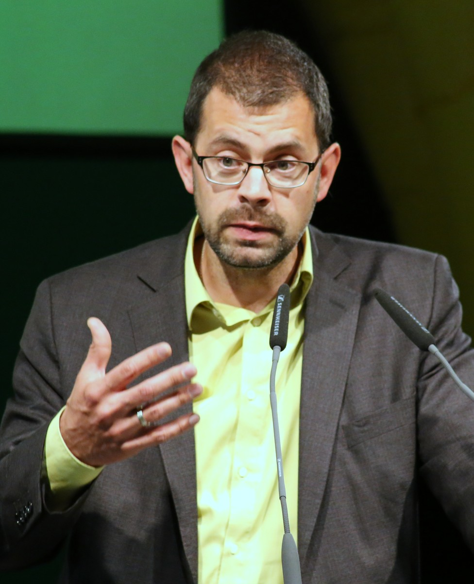 Jens Marco Scherf, bayerischer Politiker (Bündnis 90/Die Grünen), hier während des 1. Kleinen Parteitags der Bayerischen Grünen in München